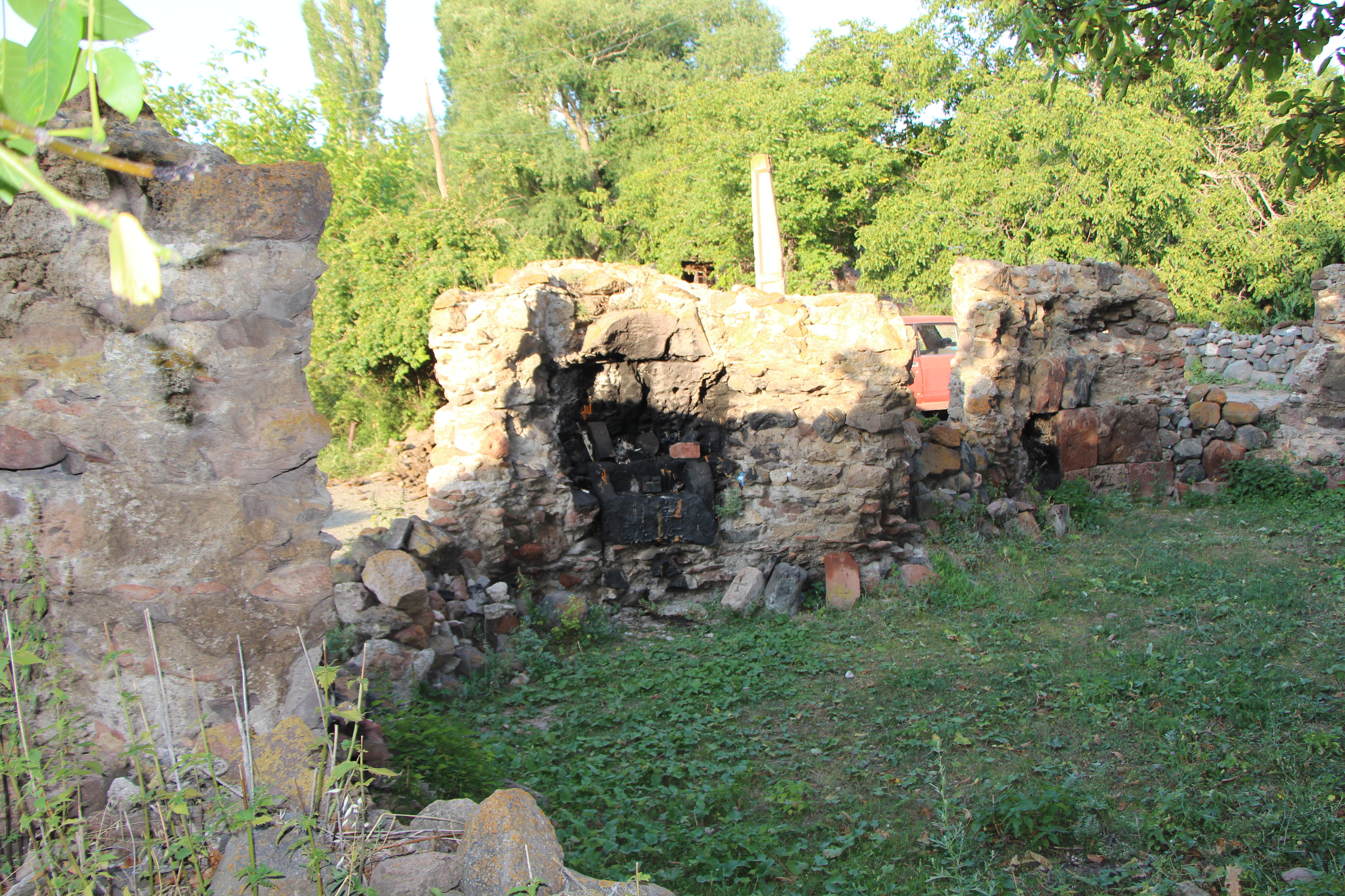 Ներքին Սասնաշեն, Արագածոտնի մարզ, ԵԿԵՂԵՑԻ 7 դ. ամ մասում 2.74/5 Եռախորան, ավերակ 74/5